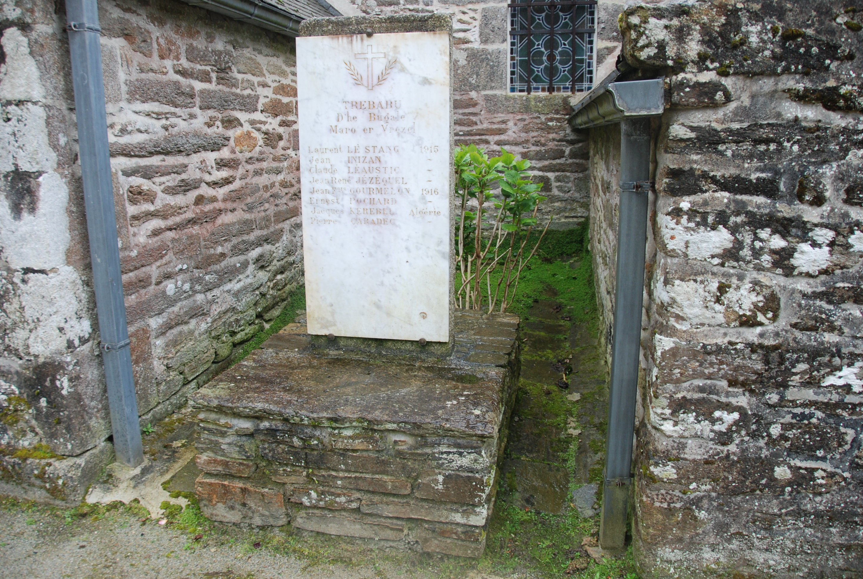 Monument aux Morts - Trébabu-29